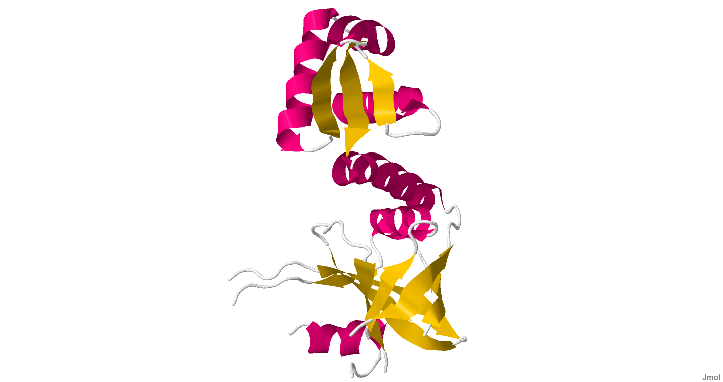 Riboflavin Kinase